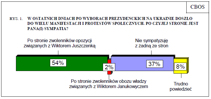 Rysunek przedstawia rozkład odpowiedzi na pytanie o sympatie Polaków względem sił politycznych w czasie Pomarańczowej Rewolucji